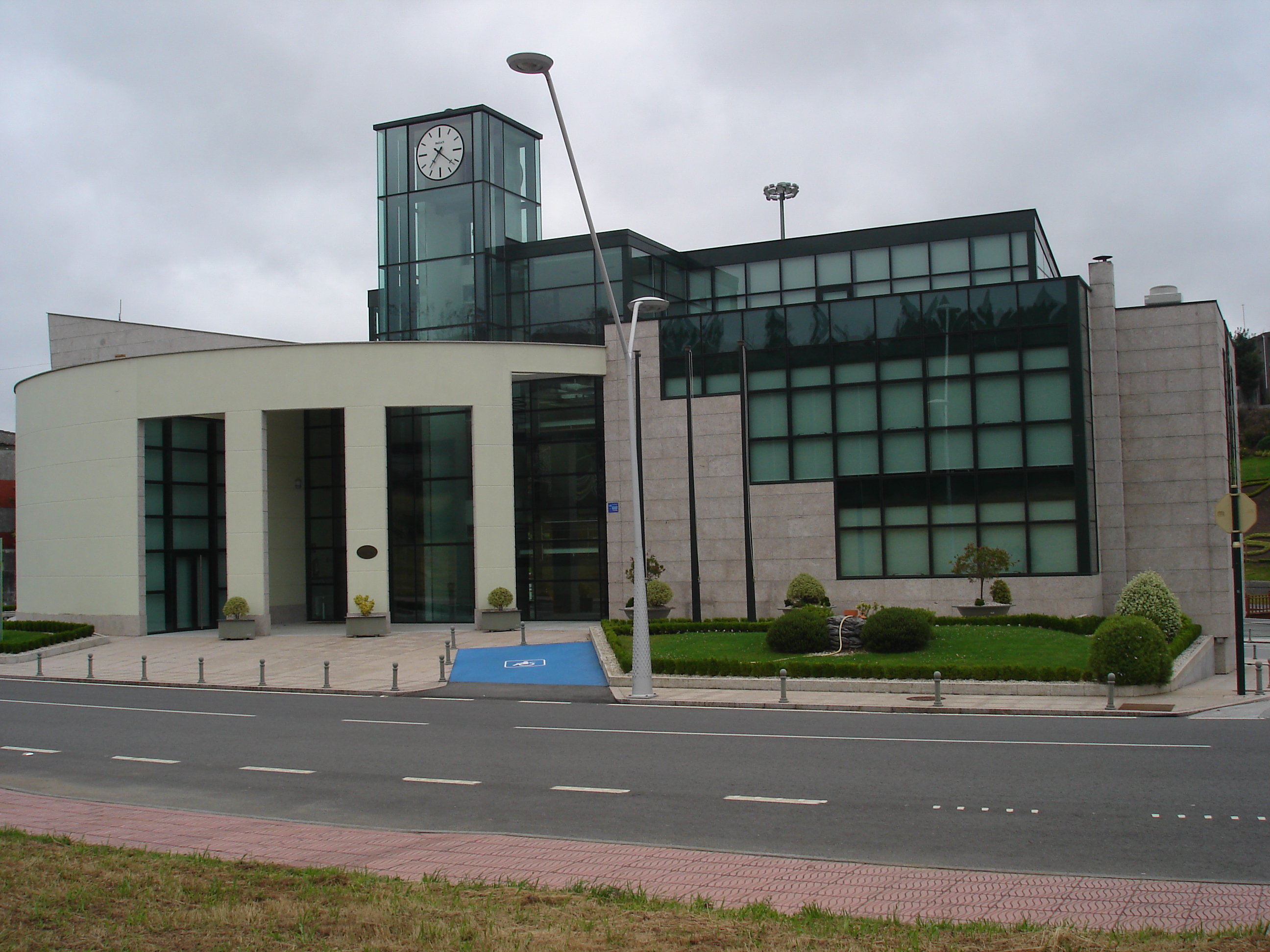 Casa do Concello de As Somozas.JPG Somozas Categoría:Imaxes das Somozas